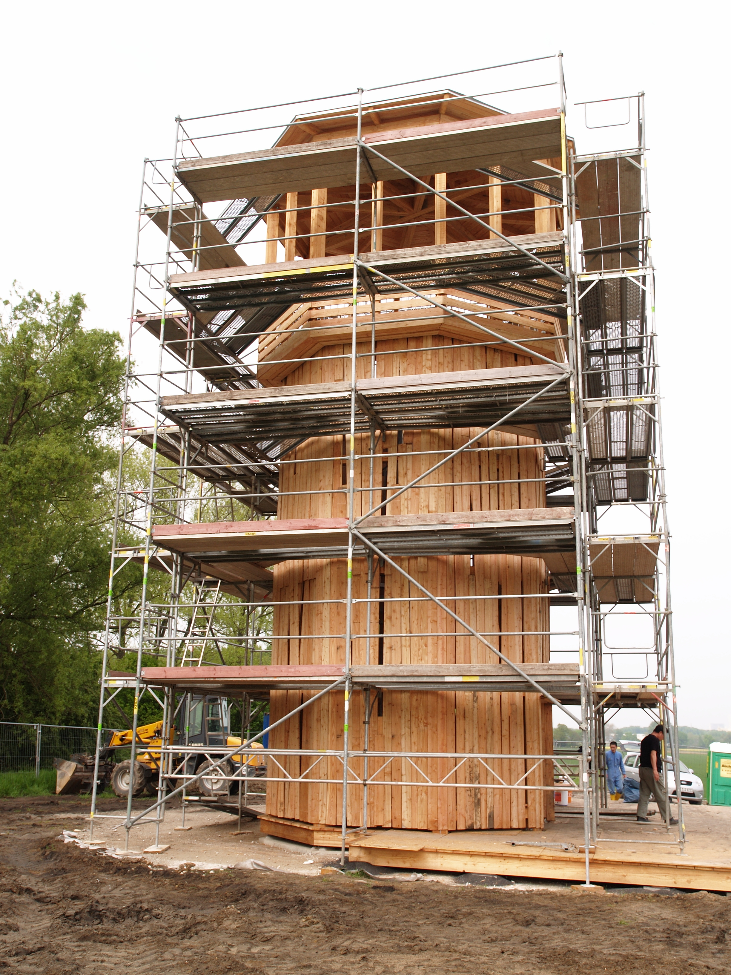 Tadashi Kawamata (rechts) an seiner Skulptur Walkway and Tower. Die Skulptur wird im Rahmen des Projektes Emscherkunst.2010 errichtet.